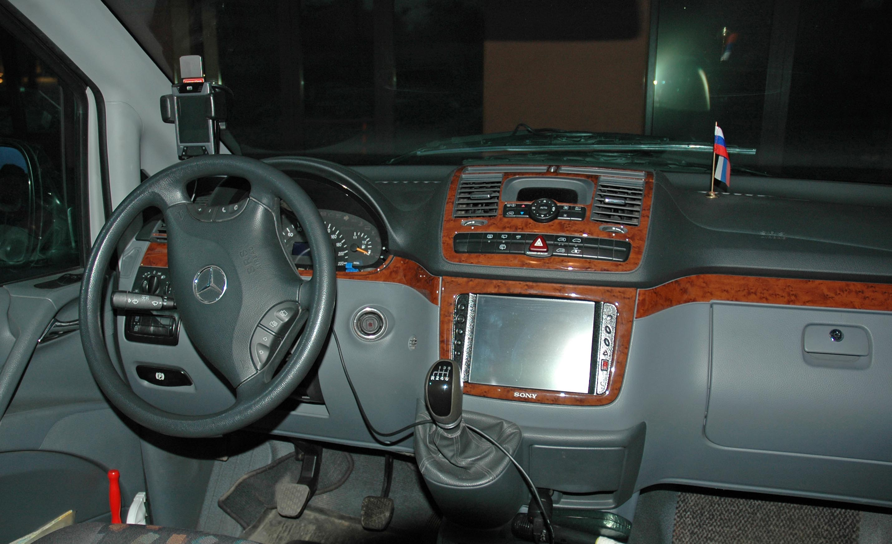 onboarder